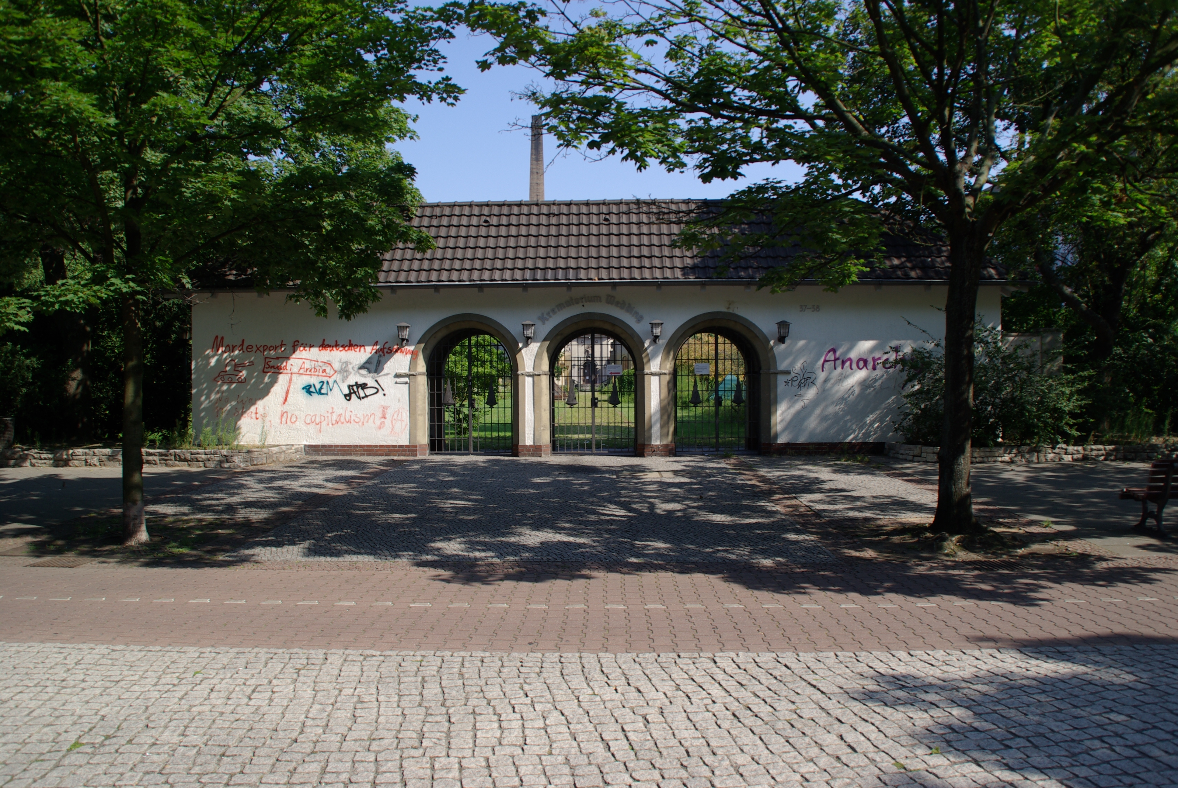 Berlin-Wedding. Der Urnenfriedhof in Berlin-Wedding steht unter Denkmalschutz. Der Eingagn zum Friedhof entstand 1935. In dem Eingang befindet sich das Krematorium.